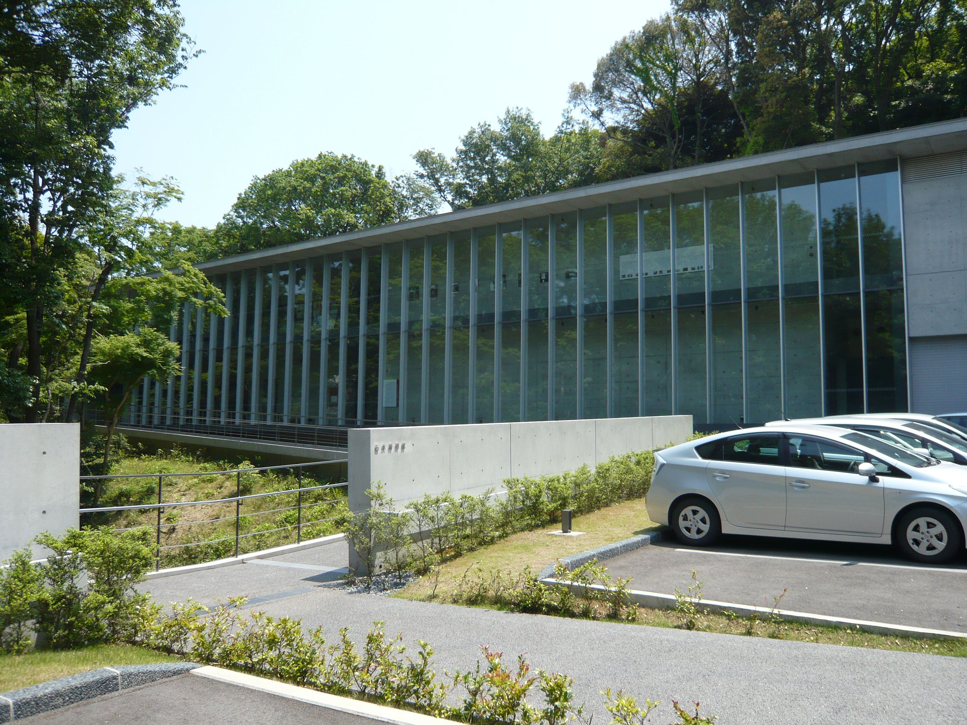 石水博物館。川喜田半泥子および川喜田家の美術品を所蔵する博物館。